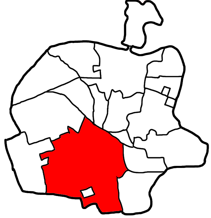 În această imagine este Făgărașul împărțit în cartiere. Cartierul în roșu este Combinat.